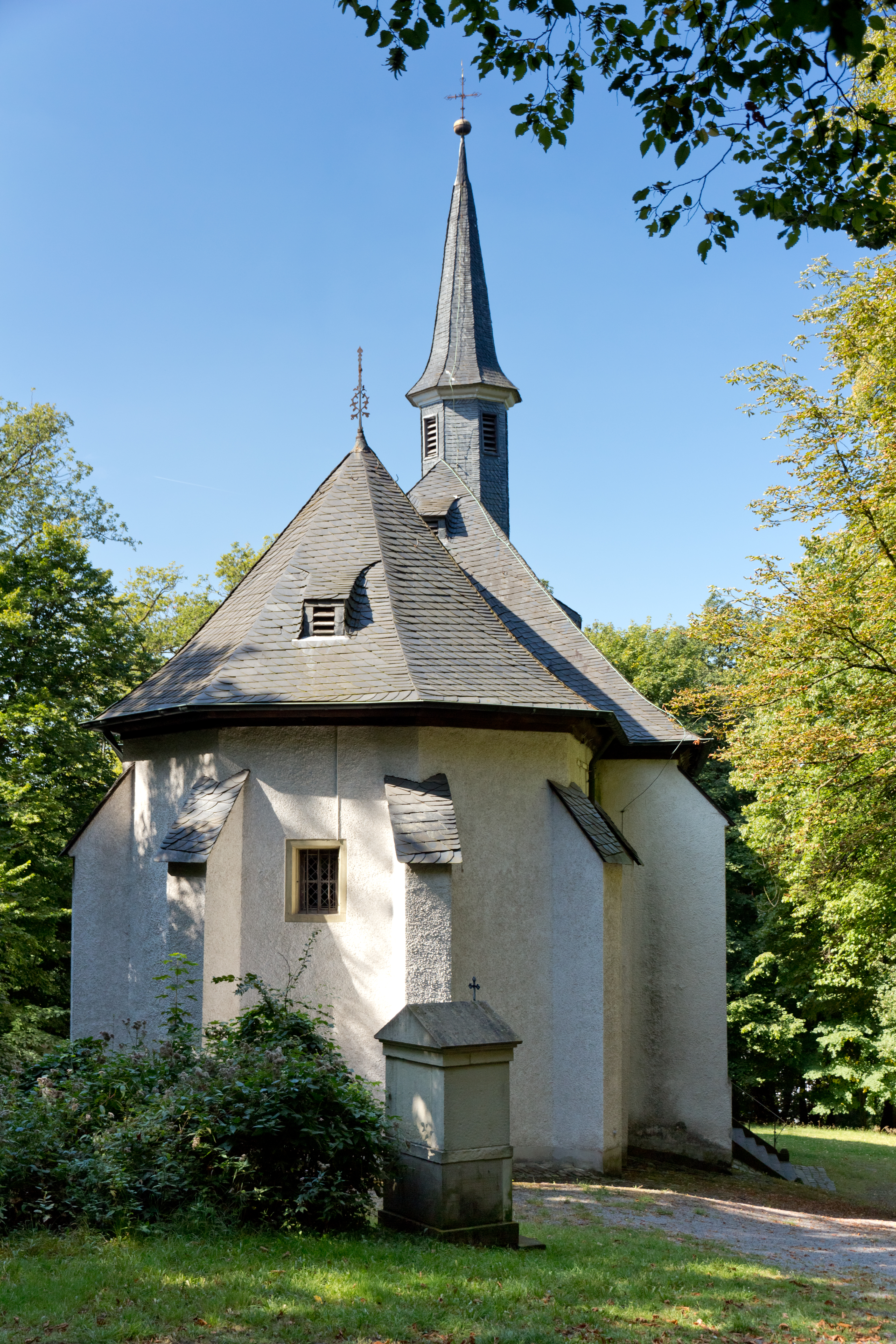 Kapelle St. Antonius auf dem Rodenberg in Menden (Sauerland)This is a photograph of an architectural monument., no. 4